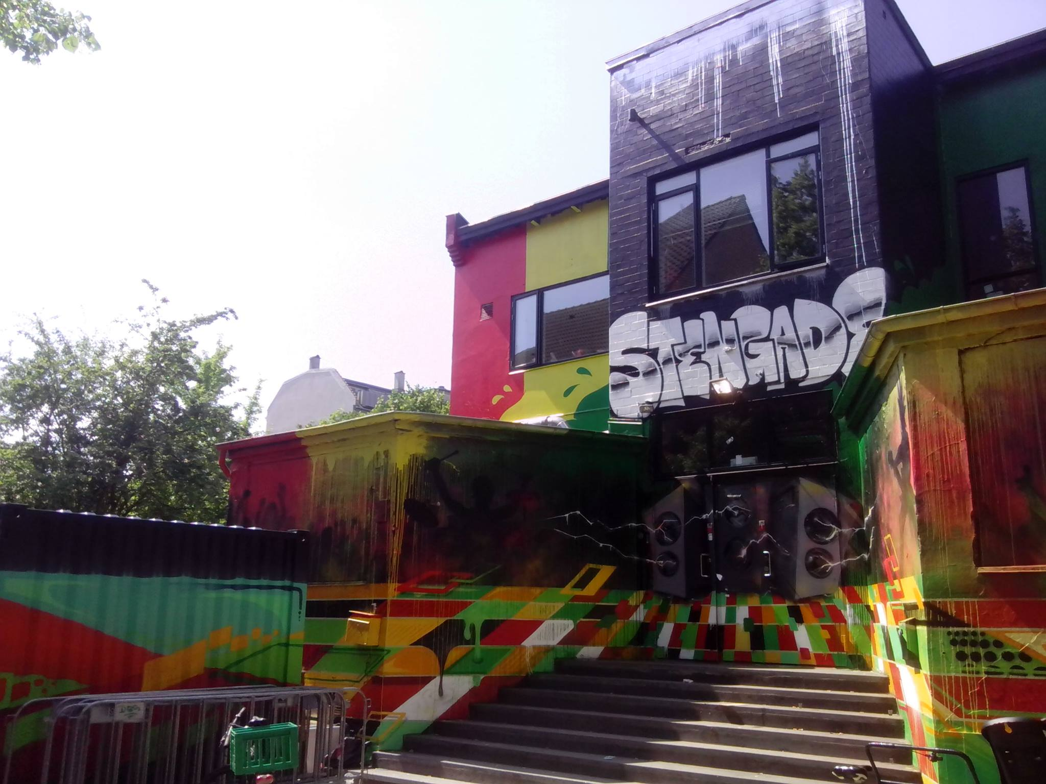 Spillestedet Stengade 2015